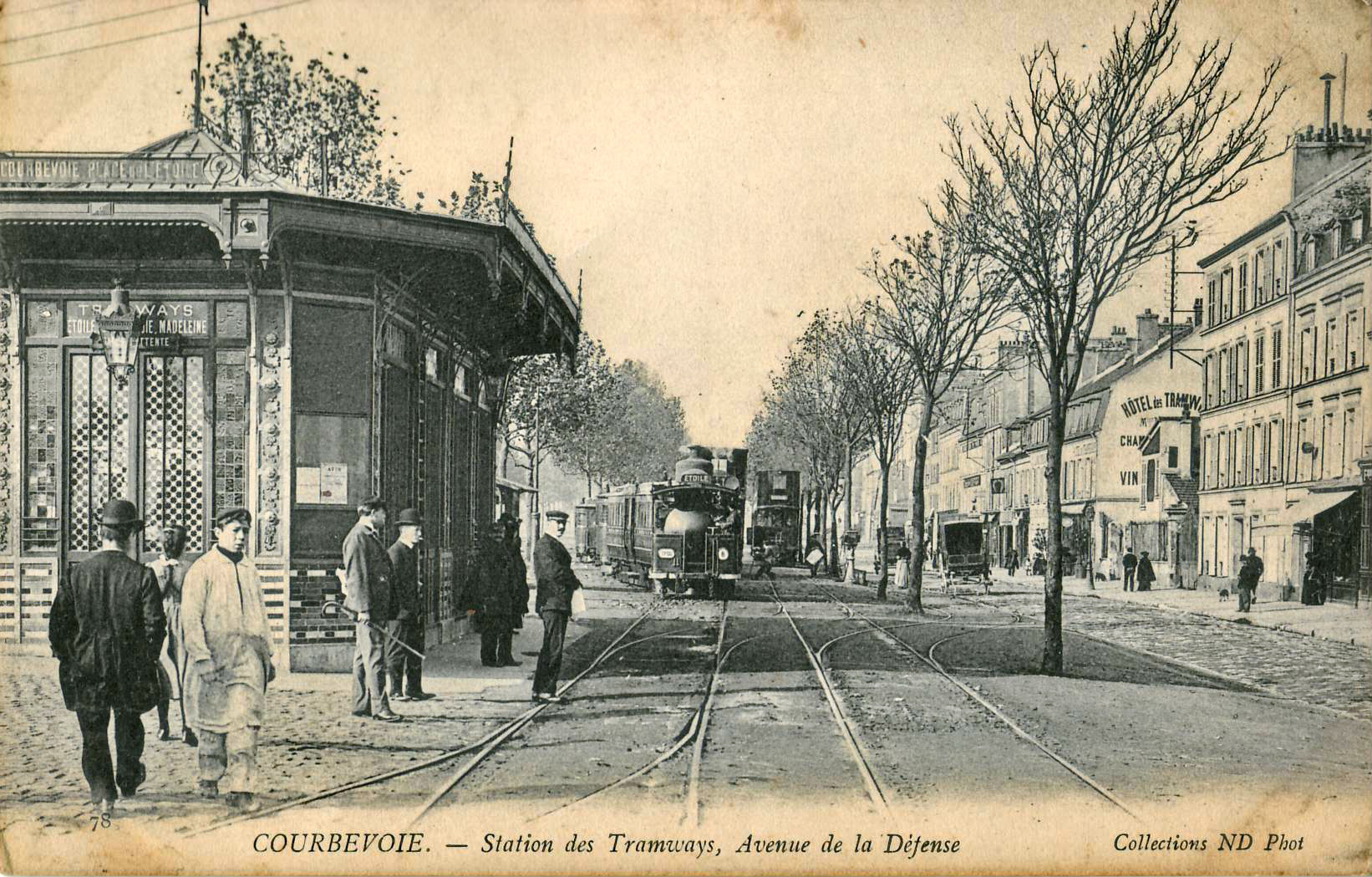 Carte postale ancienne éditée par ND, n°78 :COURBEVOIE - Station des Tramways, Avenue de la Défense